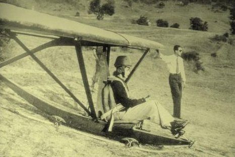 Horthy Istvánné a Tücsök pilótája